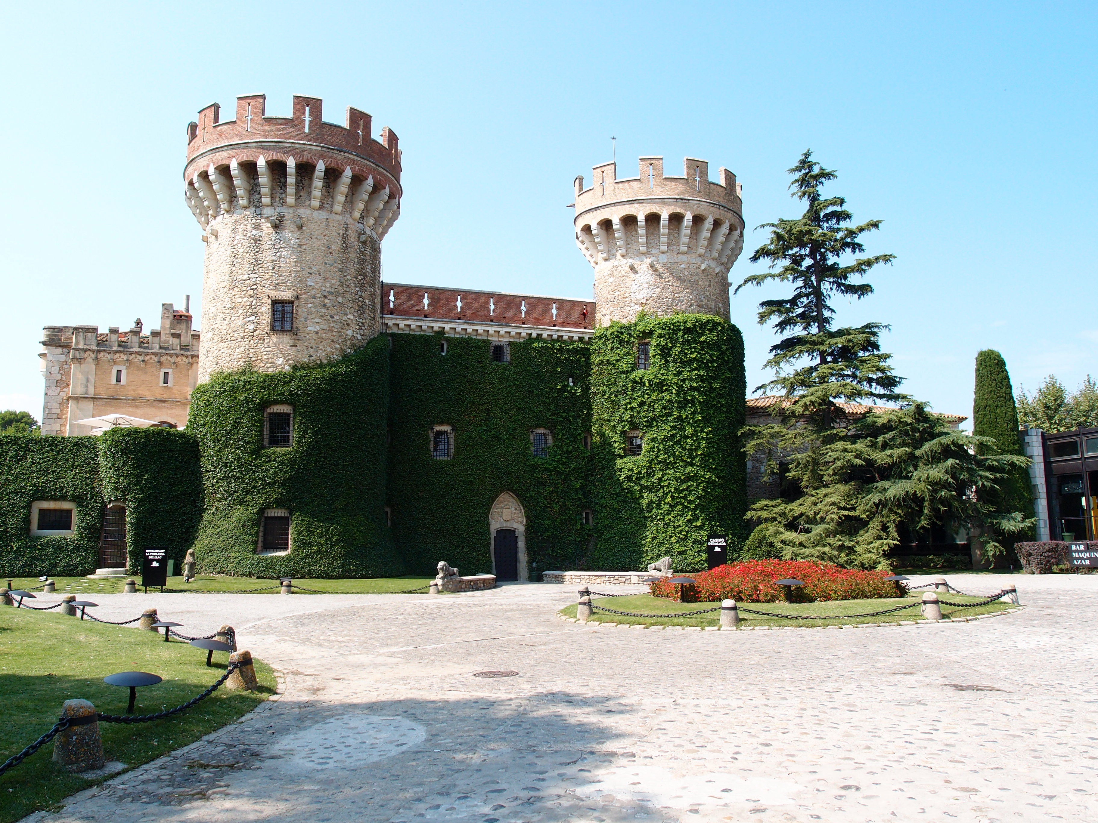 Castell del Peralada (Casino) - Katalonien/Spanien Datum: 05.09.2012 Urheber: M. Pfeiffer alias Gordito1869 Quelle: Privates Fotoarchiv des Urhebers